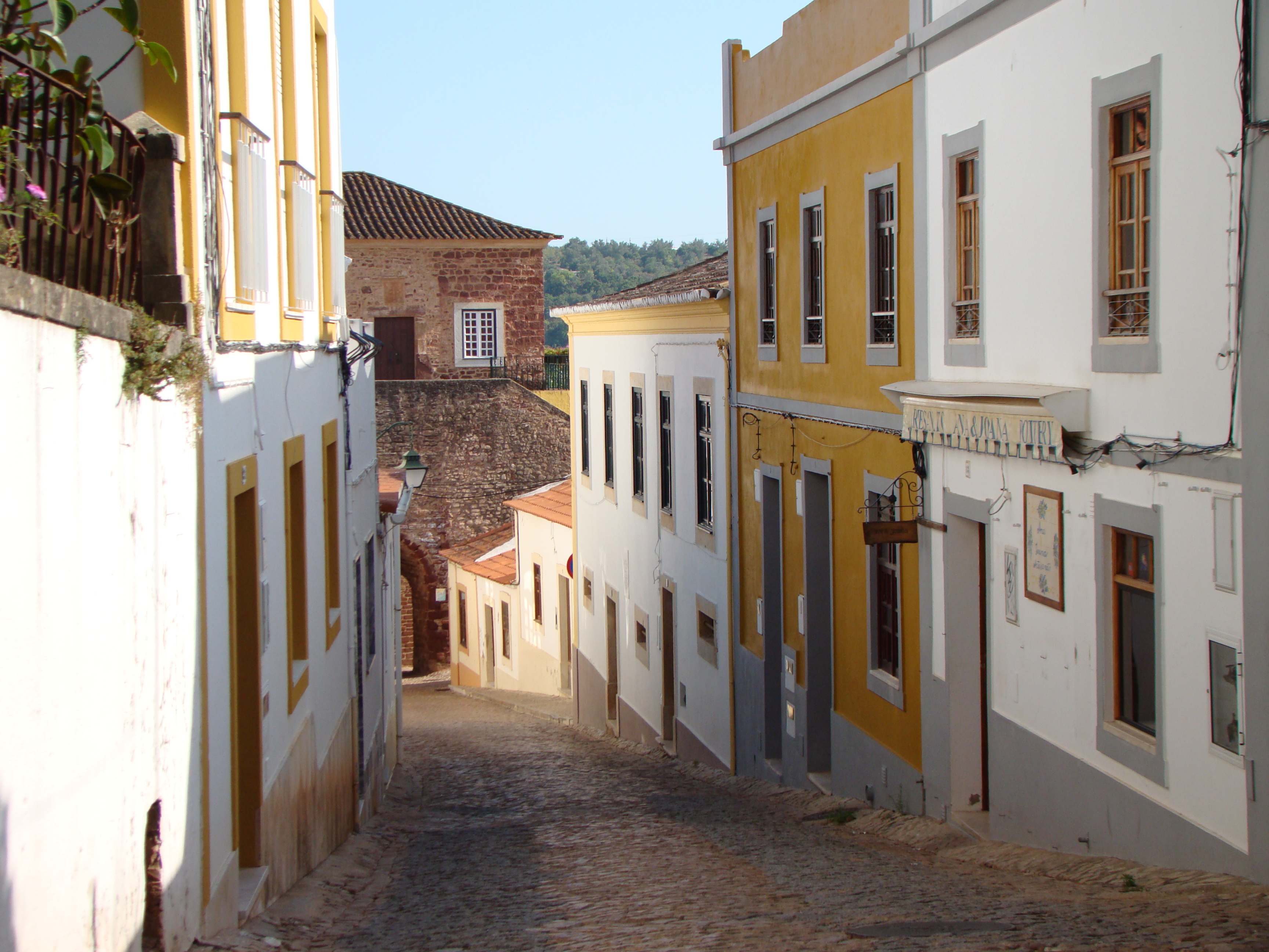 Rua em Silves